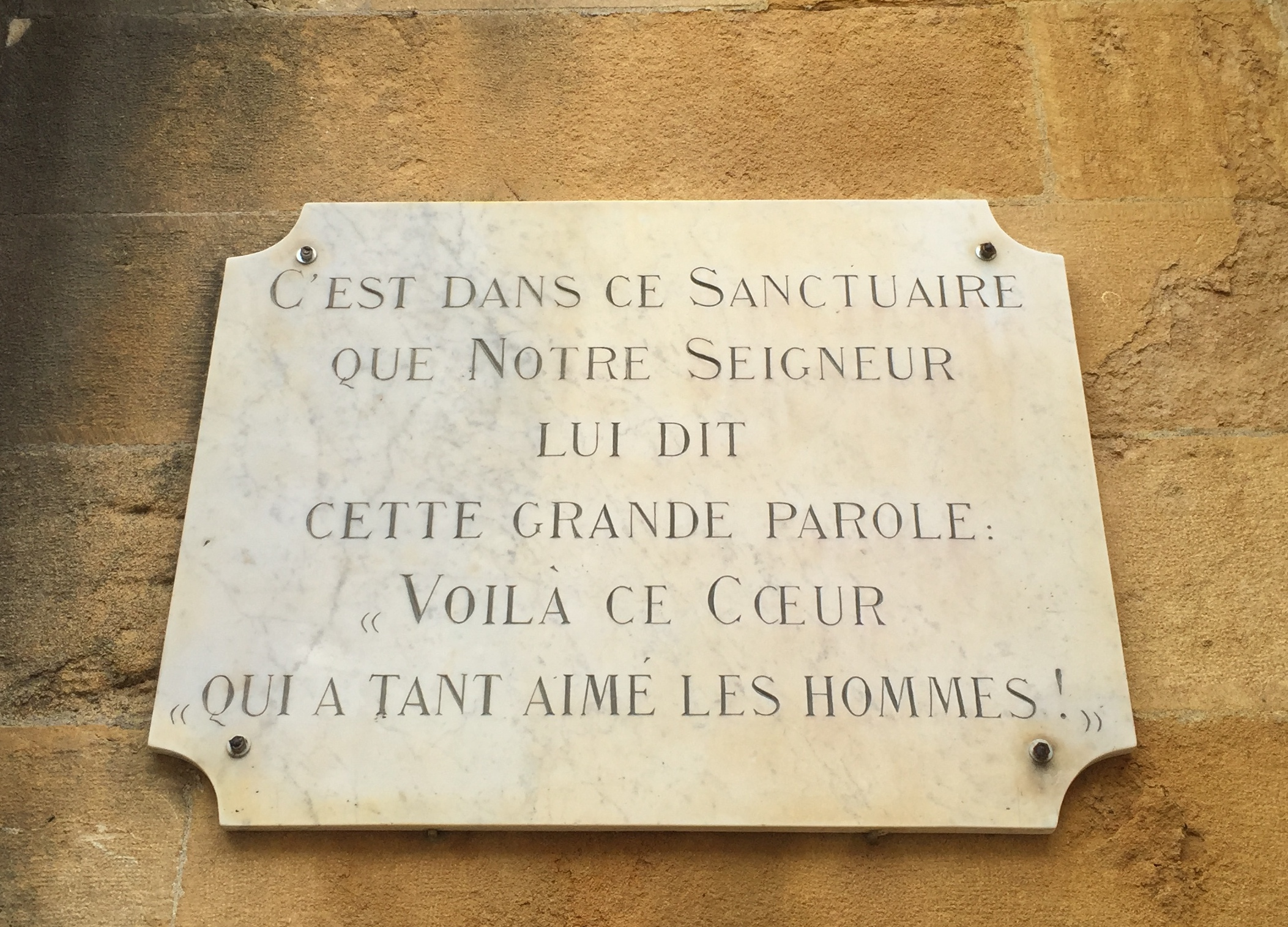 Image de Paray-le-Monial, Saône-et-Loire, France.